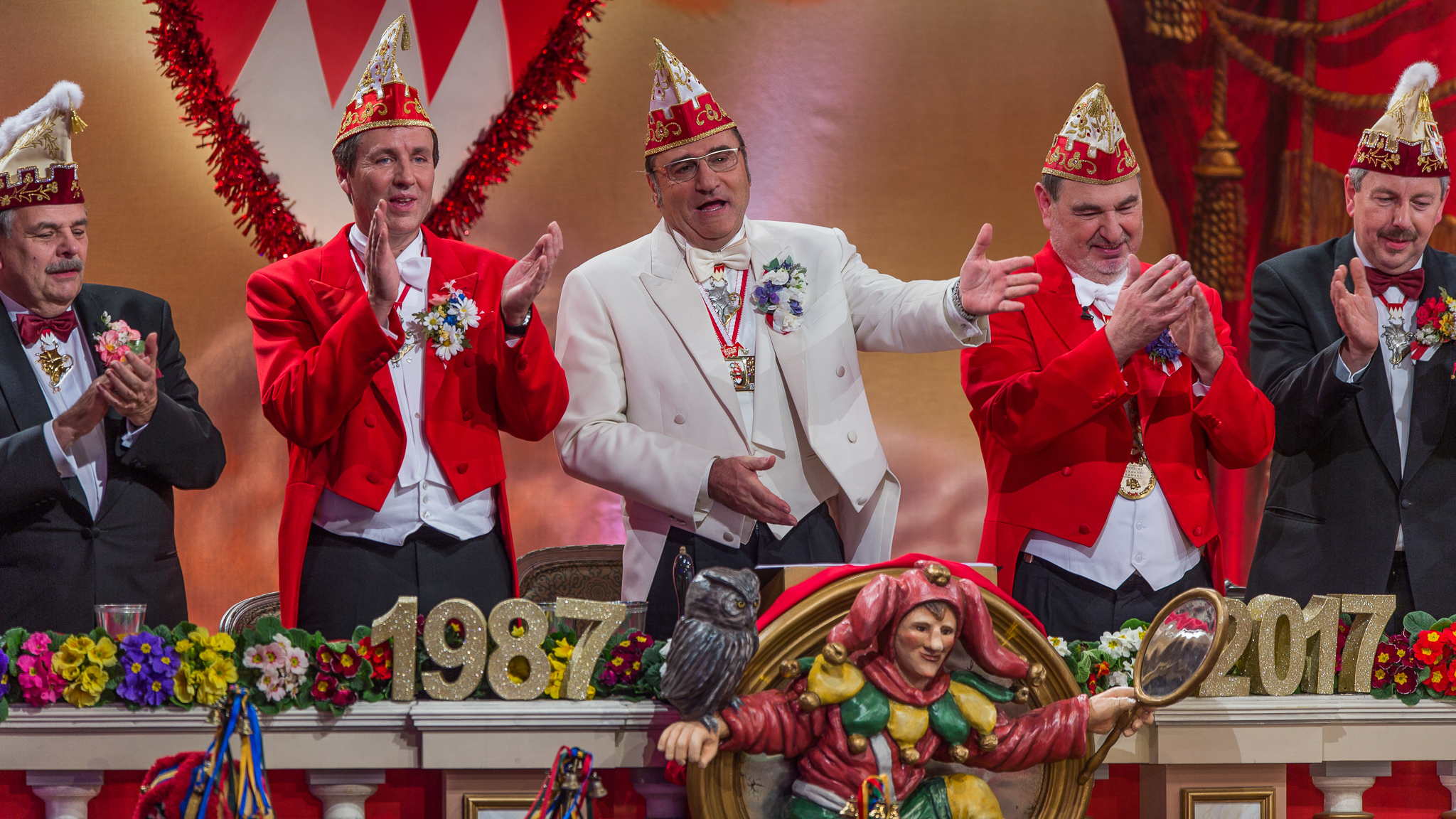 BR,Bayerisches Fernsehen,Bernhard John Händel,Elferrat,Fastnacht in Franken,Fastnachts-Verband Franken,Karneval,Live-Sendung,Mainfrankensäle